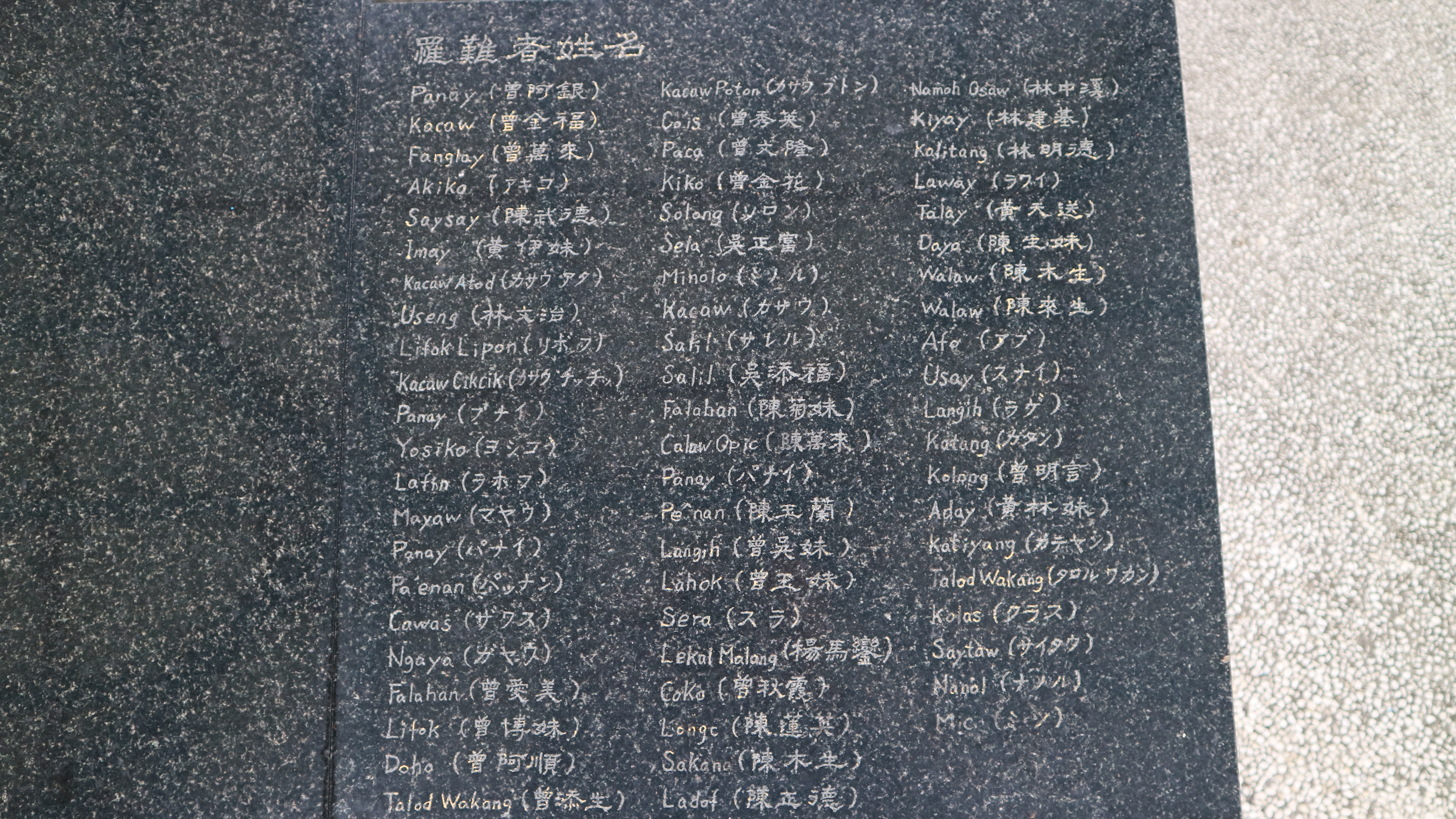 重安霍亂事件紀念碑